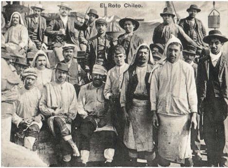 Con el adjetivo substantivado roto se denomina en Chile, en general, a un tipo humano, la persona de origen urbano y pobre. En Chile mismo, desde comienzos del siglo XX, el término comienza a adoptar una connotación clasista (negativa), en referencia a los pobres de las ciudades. Actualmente denota, cada vez con mayor frecuencia, a quienes tienen malos modales o costumbres vulgares, sin ser necesariamente de clase baja.